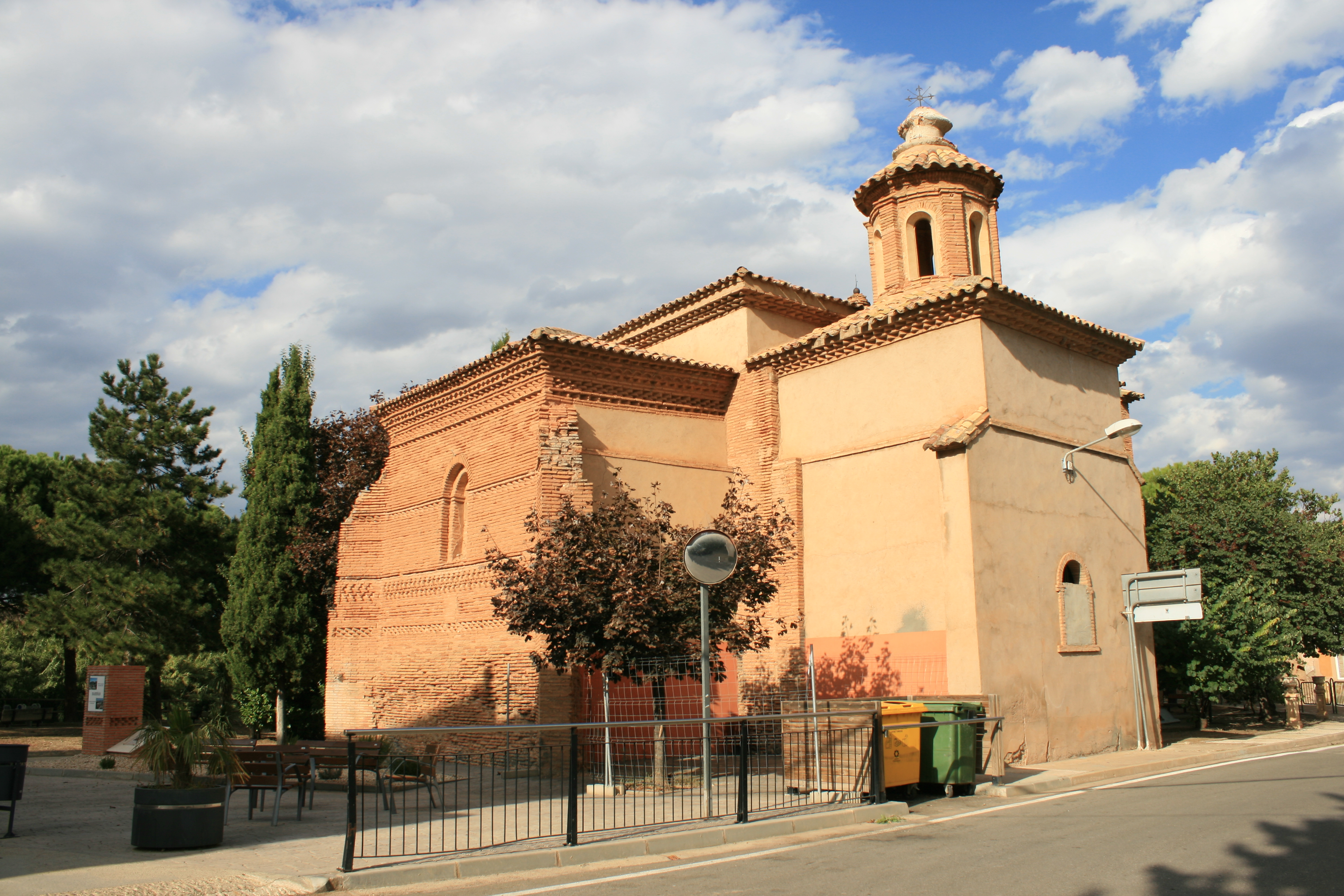 Sabiñán, Zaragoza